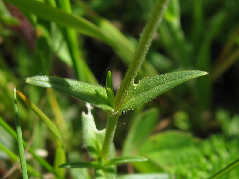 Acker-Hornkraut Cerastium arvense, Stoltera Nähe Rostock